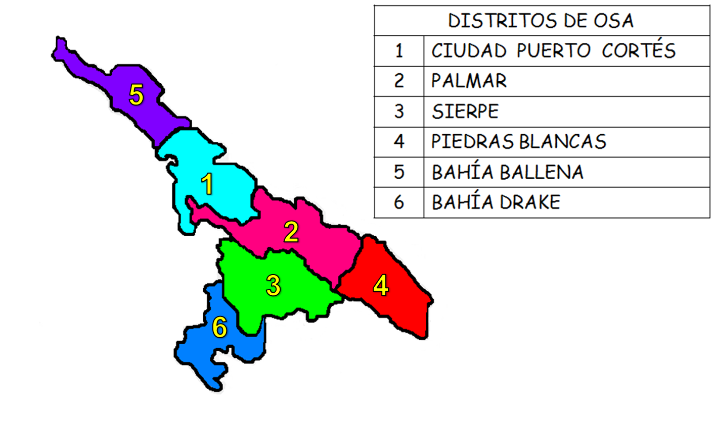 Mapa de Distritos del Municipio de Osa